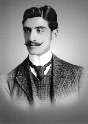 Don Jose Aurelio Dueñas Borja